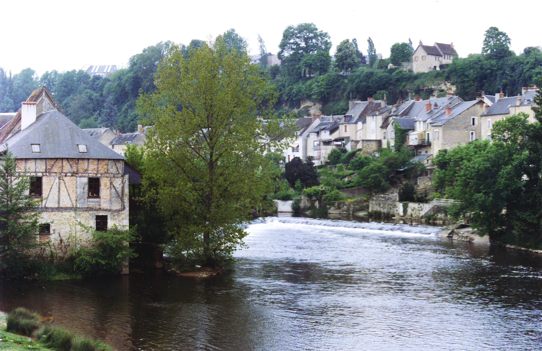 Argenton-sur-Creuse, village.Argenton sur Creuse